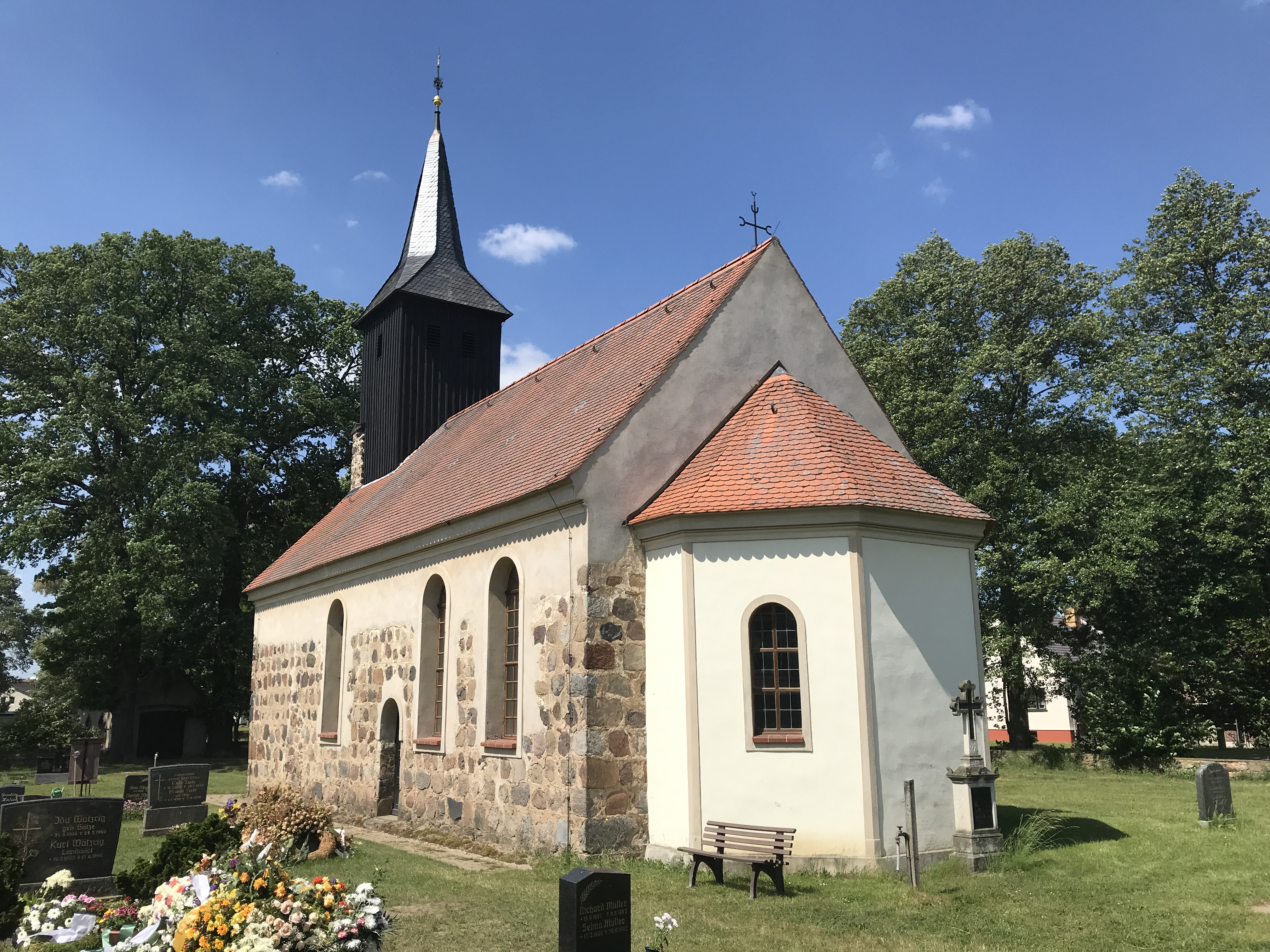 Die Dorfkirche in Zöllmersdorf der Stadt Luckau entstand um 1300 und wurde 1911 erheblich umgebaut.